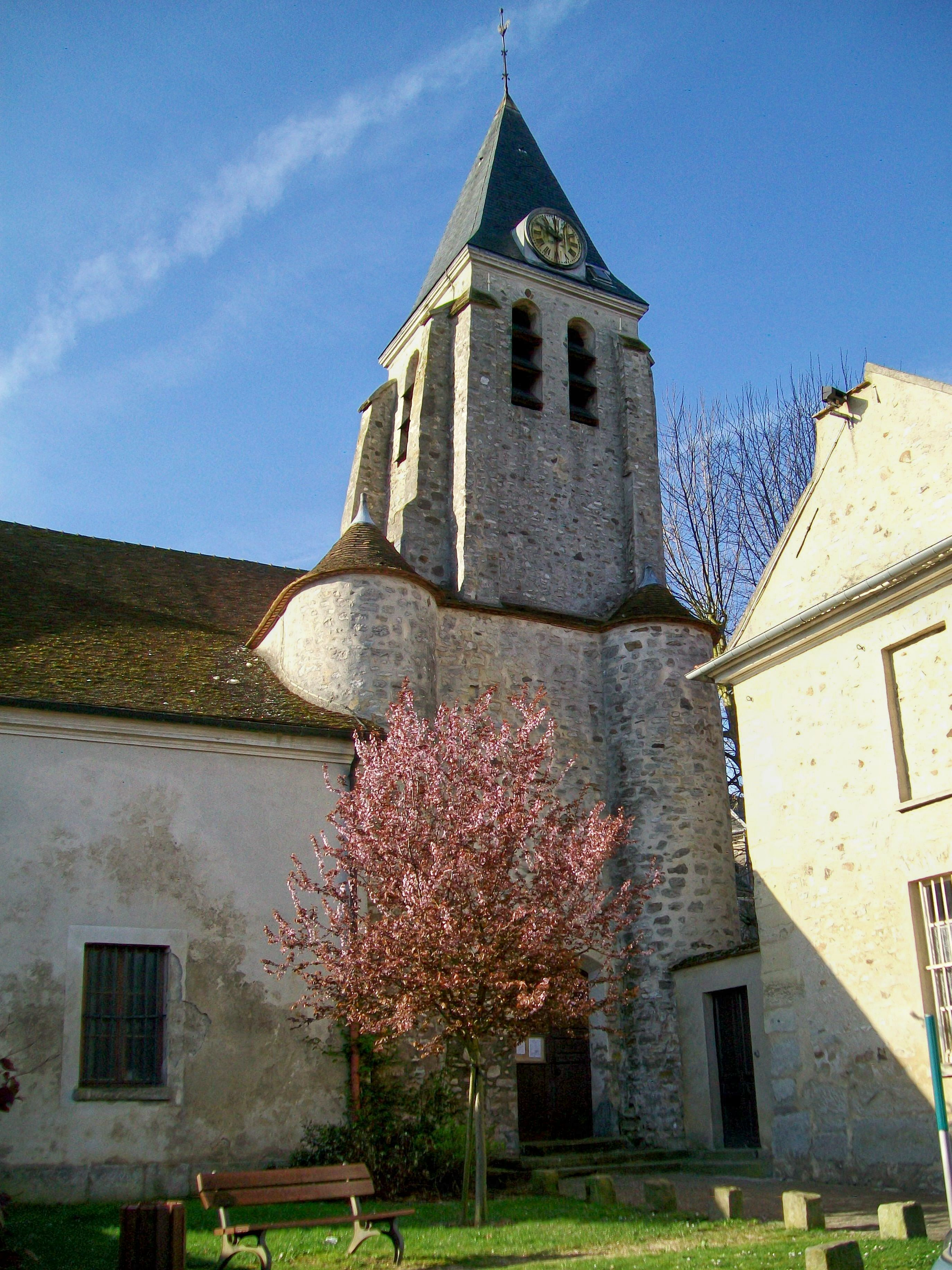 Clocher et portail de l'église Sainte-Geneviève, côté nord, à gauche de l'ancienne mairie.